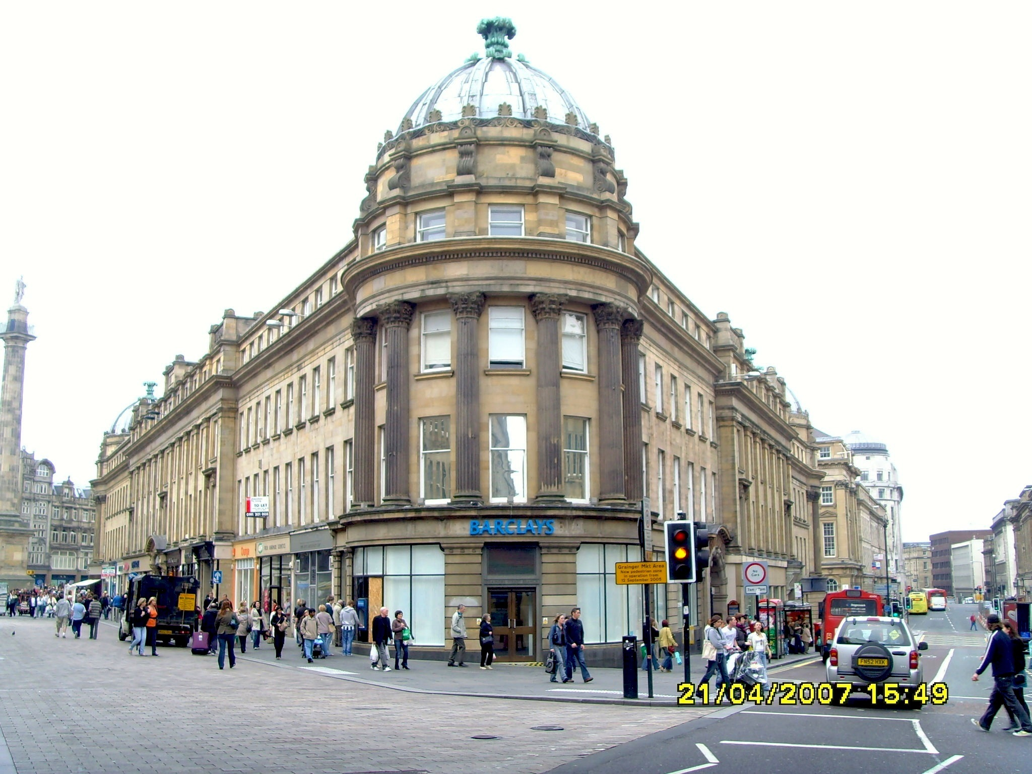 Grainger Market Area